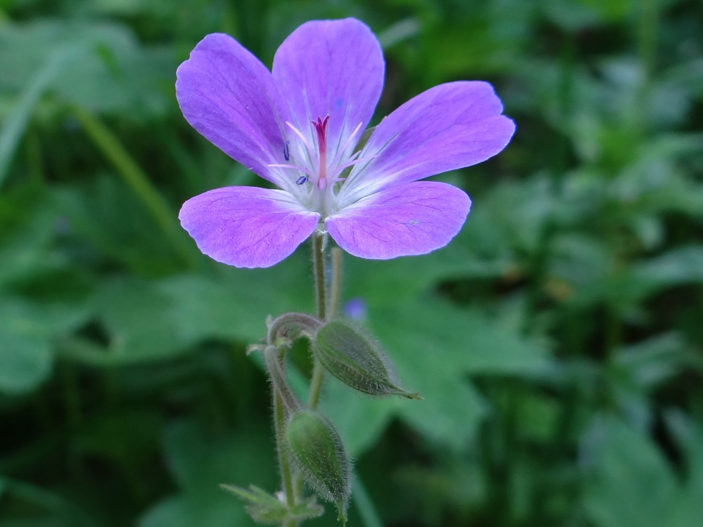 Geranium' sylvaticum